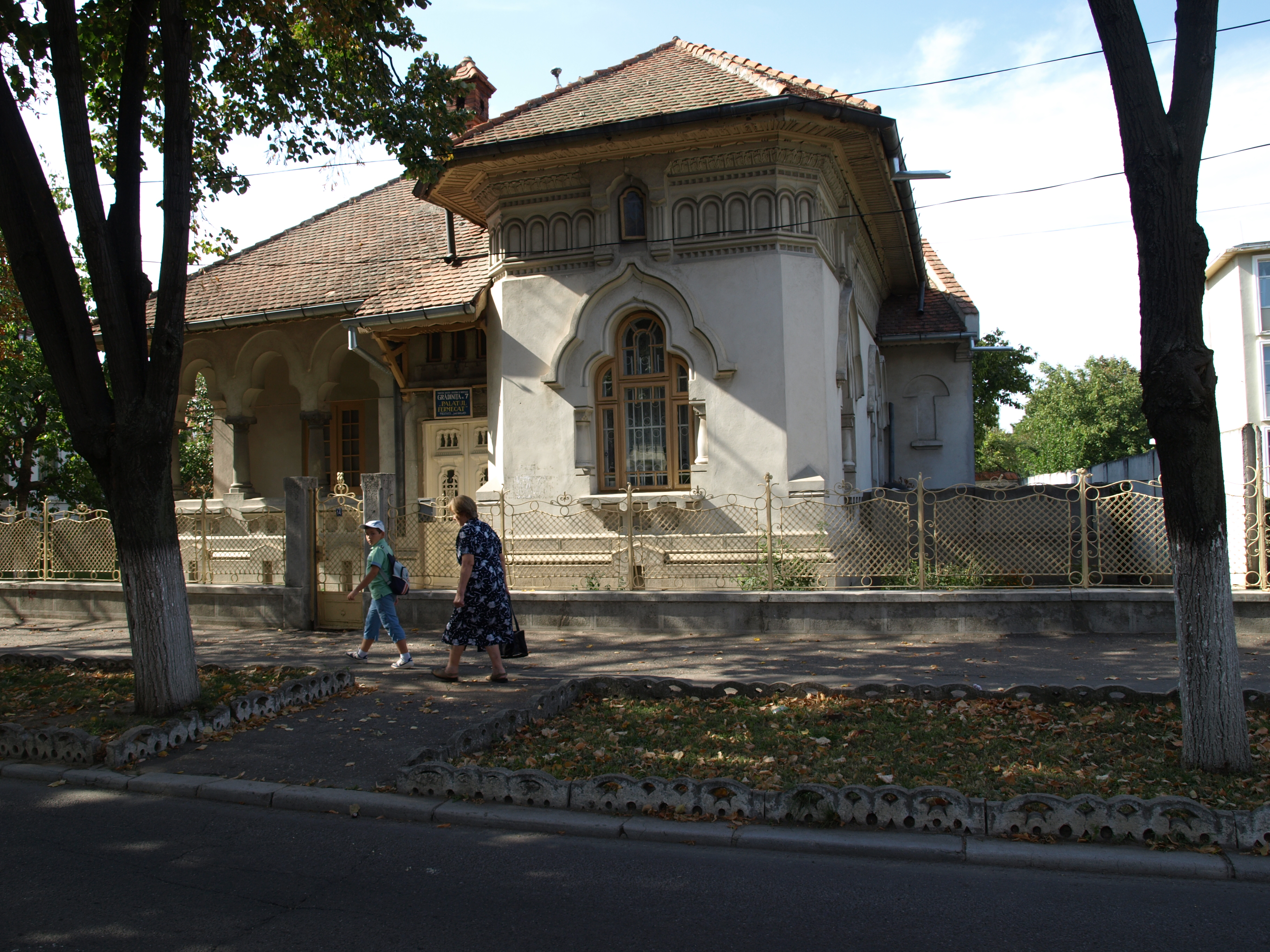 Casă - acum gradinita de copii